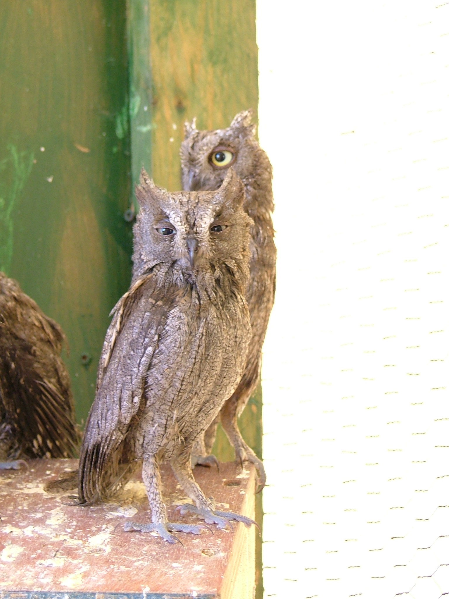 Otus scops in Ekpaz, Aegina, Hellas